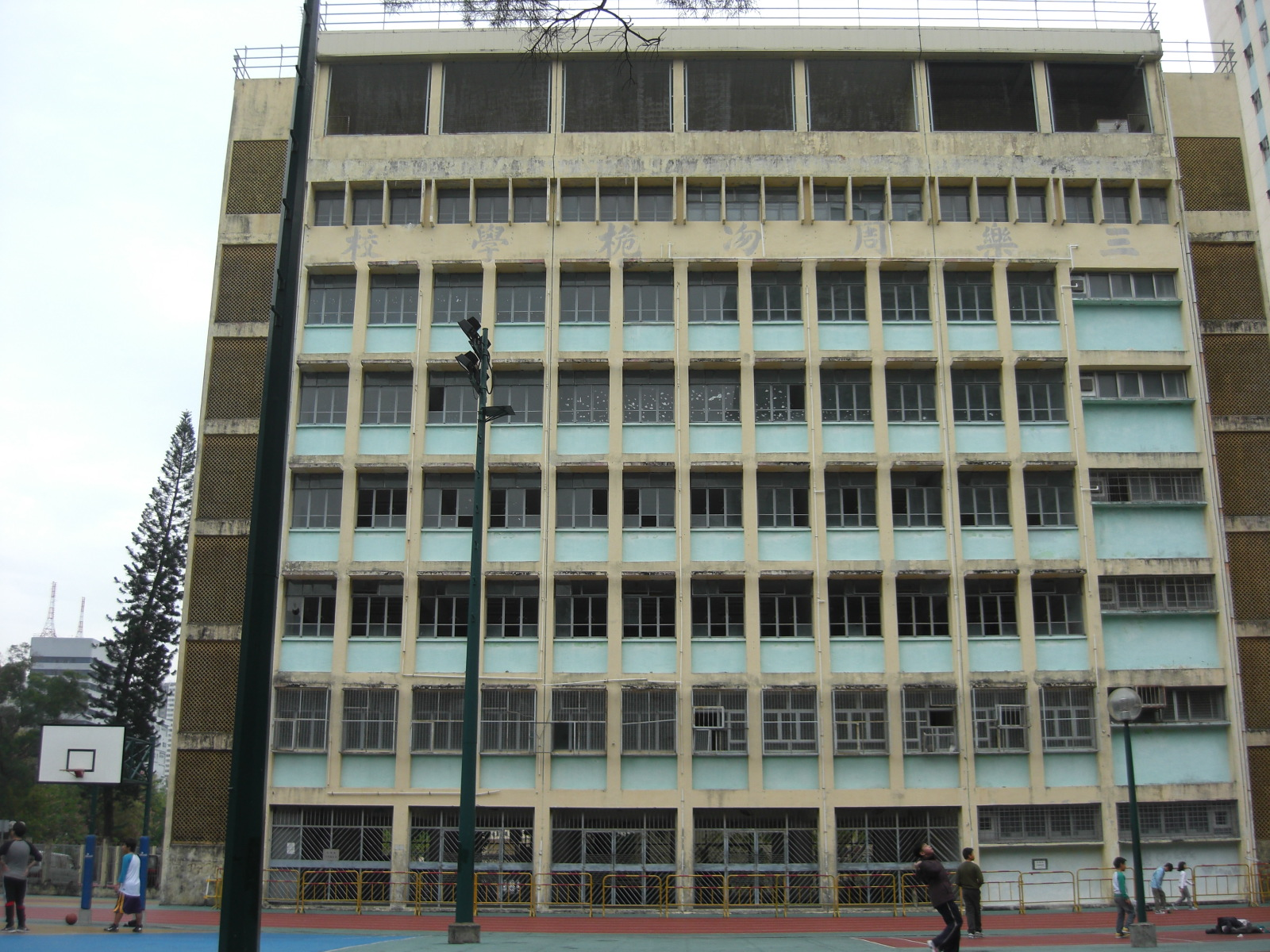 空罝多時的前孔教學院三樂周𠖳桅學校現況,攝於2012年尾